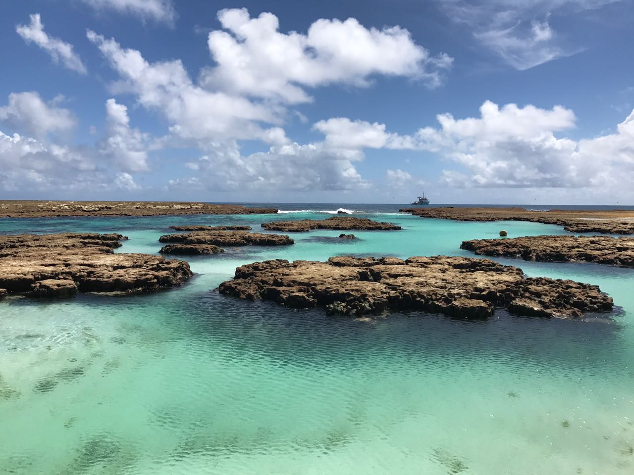 Parque ecologico brasileiro